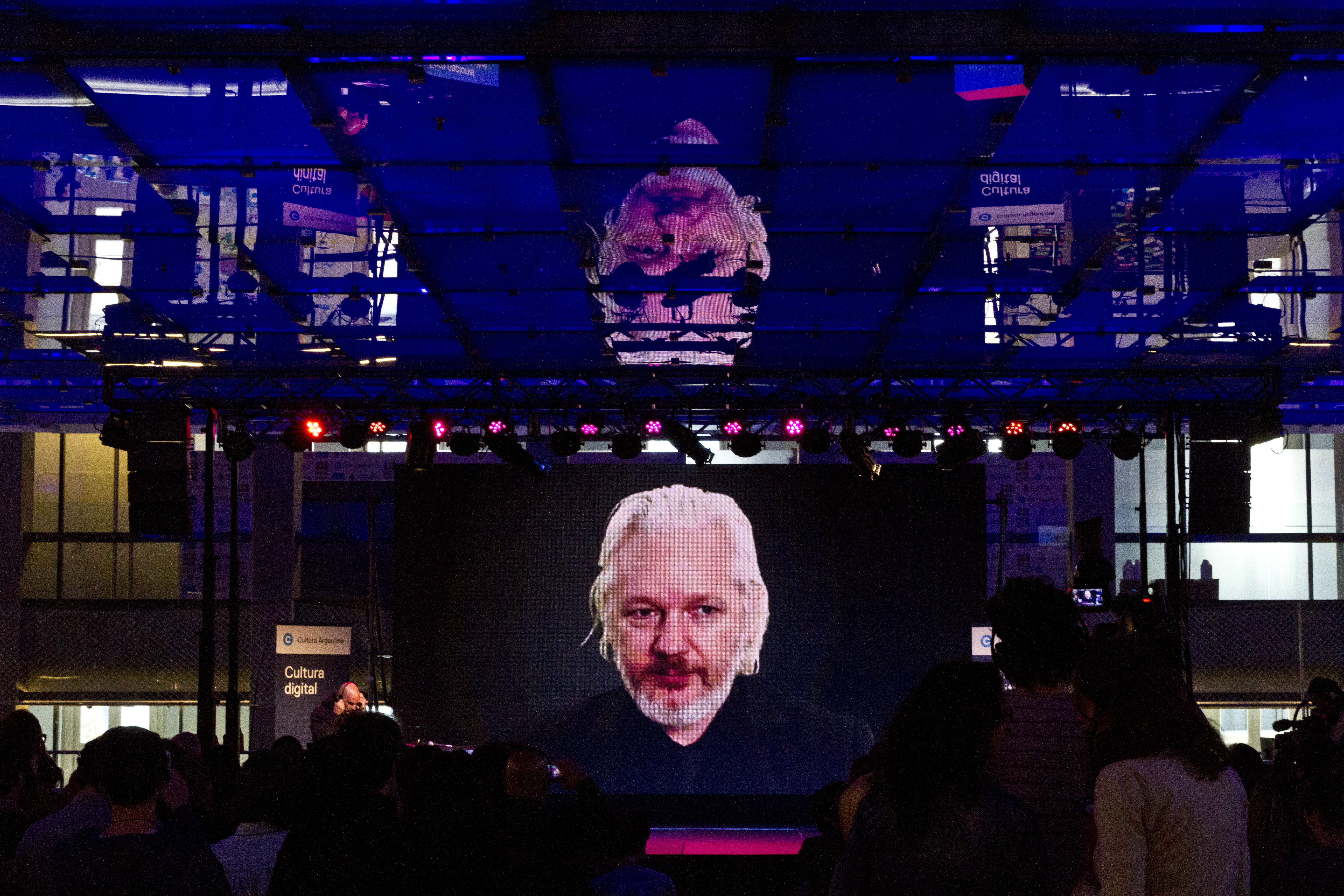 Buenos Aires, 15 de octubre de 2015 - En el marco de los Foros Cultura Digital, organizado por el Ministerio de Cultura de la Nación, en e Centro Cultural Kirchner, se realizó la Videoconferencia con Julián Assange. Fotos: Romina Santarelli